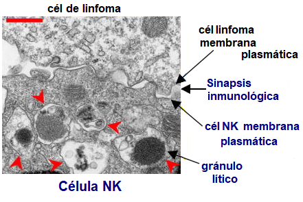 Citolisis en proceso, en una Sinapsis inmunitaria NK. En el sector medio se observa la unión de las membranas plasmáticas como Sinapsis Inmunitaria. En la mitad inferior de la micrografía se ve la Célula NK. Son evidentes los gránulos líticos en el citoplasma NK. Microscopio electrónico de transmisión.